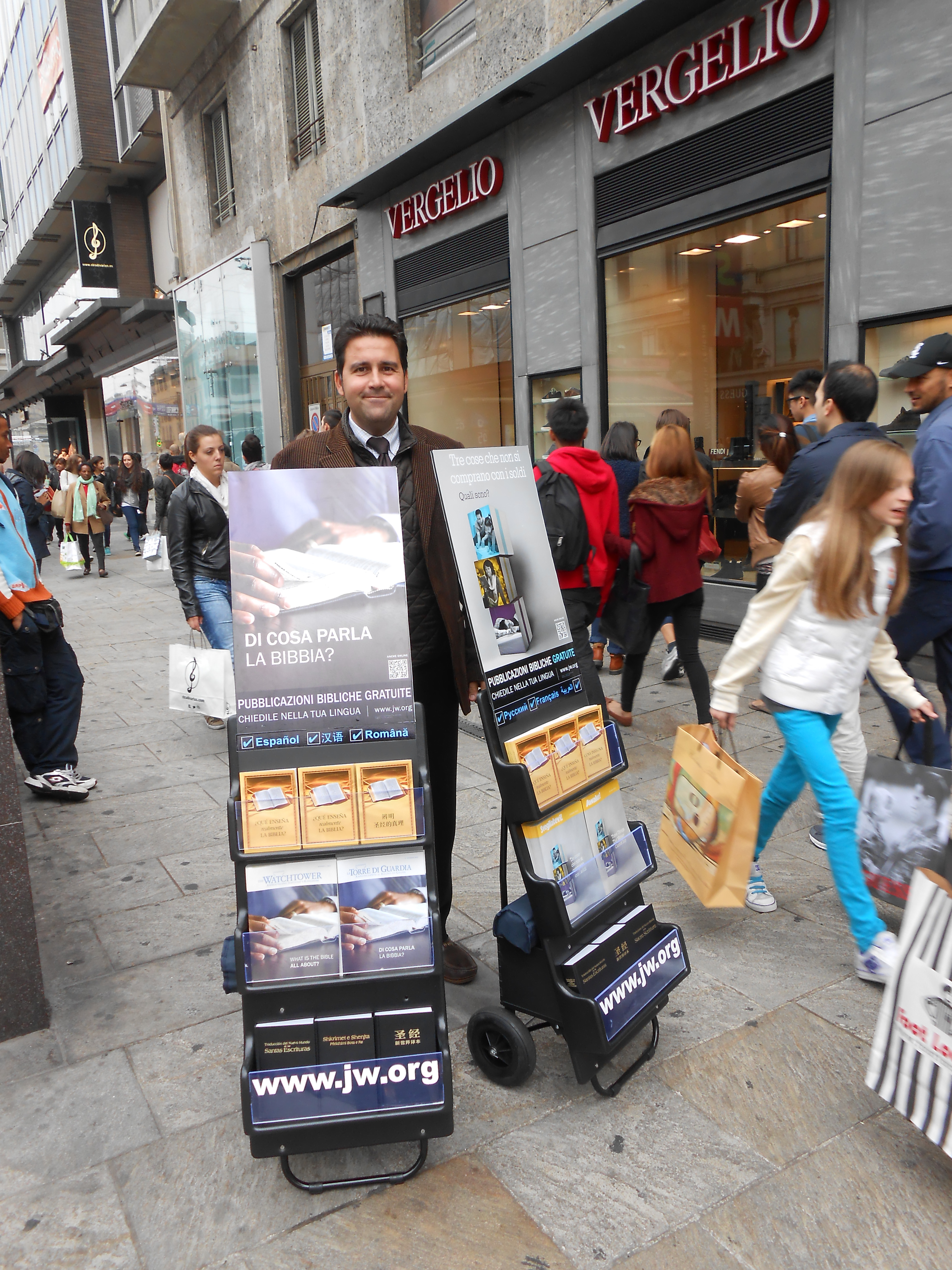 Milano - Corso Buenos Aires - Una delle principali vie della città. I testimoni di Geova predicano anche utilizzando gli espositori mobili